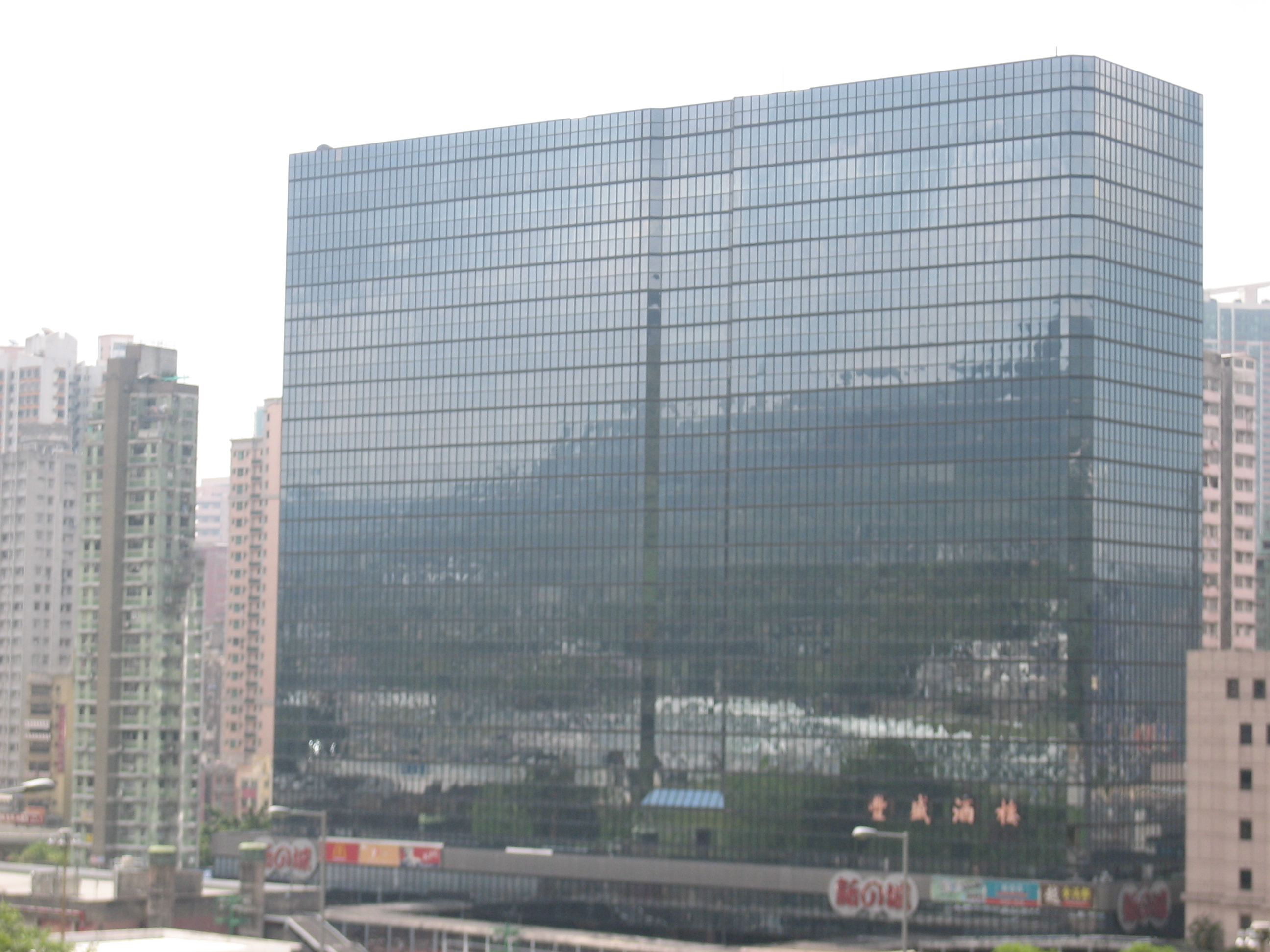 南丰中心